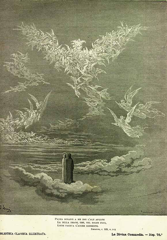 Paradiso by Dante Alighieri Illustration